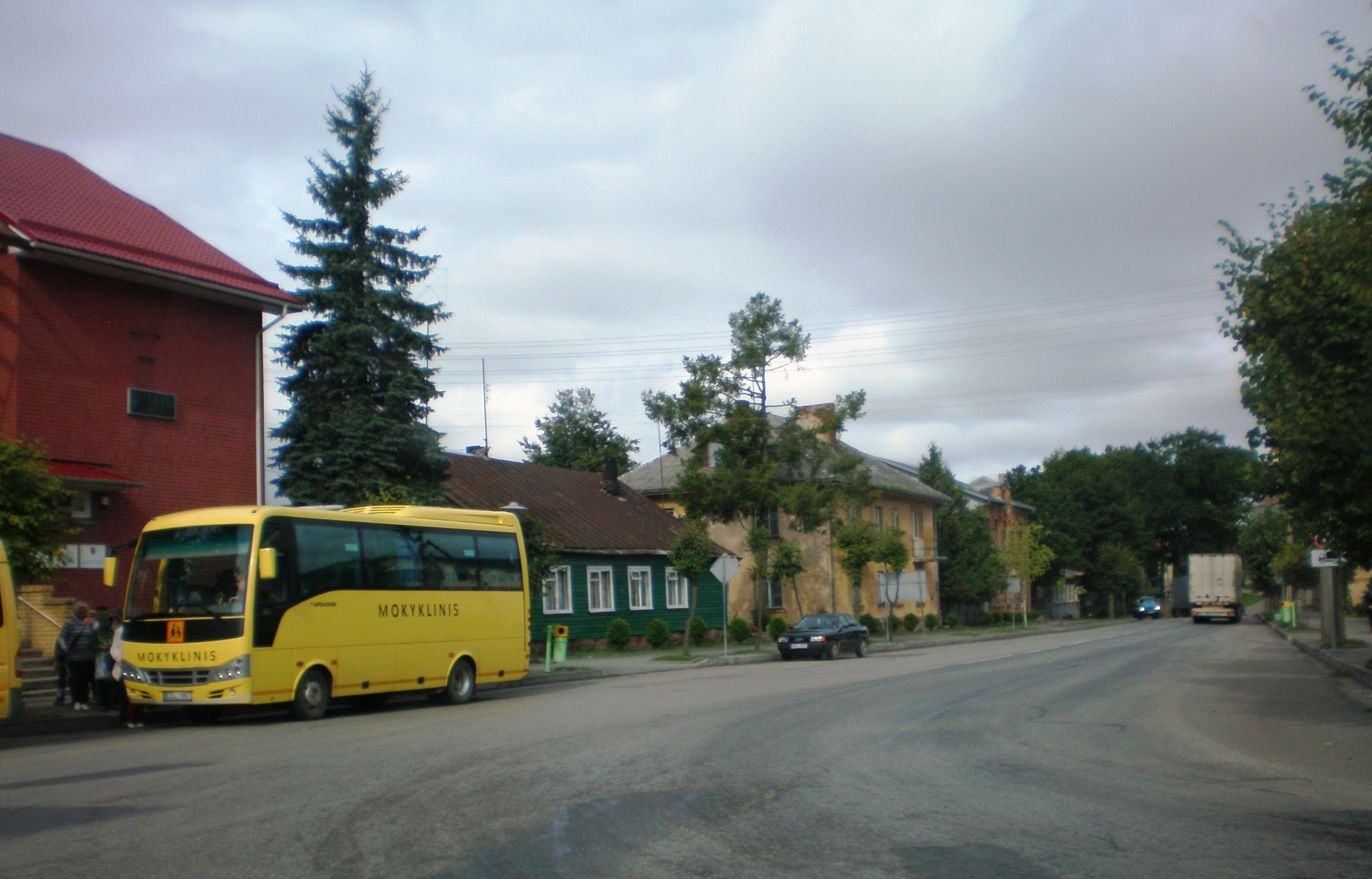 Simnas, Alytaus raj.